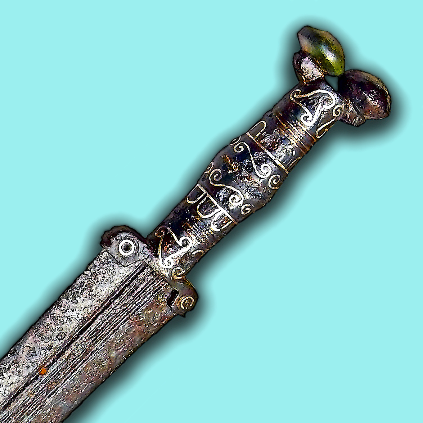 Espada corta de antenas atrofiadas tipo Arcóbriga, procedente de la necrópolis de «La Osera» , Chamartín de la Sierra en la provincia de Ávila (España). La hoja es de doble filo con nervadura central acanalada. La empuñadura y la guarda cuentan con decoración damasquinada en plata y cobre, en forma de volutas, ovas y líneas paralelas. La empuñadura es de sección circular, con nervadura central horizontal. Restaurada. Pertenece a los inicios de la Segunda Edad del Hierro, Cultura de las Cogotas-II (siglos V-III a. C.). Técnica: damasquinado para la plata presente en empuñadura y vaina, y hierro forjado para la hoja y la vaina. Longitud: 41 cm. Empuñadura de espada: Longitud: 10,20 cm; anchura máxima: 4,70 cm. Hoja de espada: Longitud = 30,50 cm; anchura máxima: 3,90 cm. Actualmente se expone en el Museo Arqueológico Nacional de España, en Madrid, con el número de inventario 1986/81/VI/200/2.